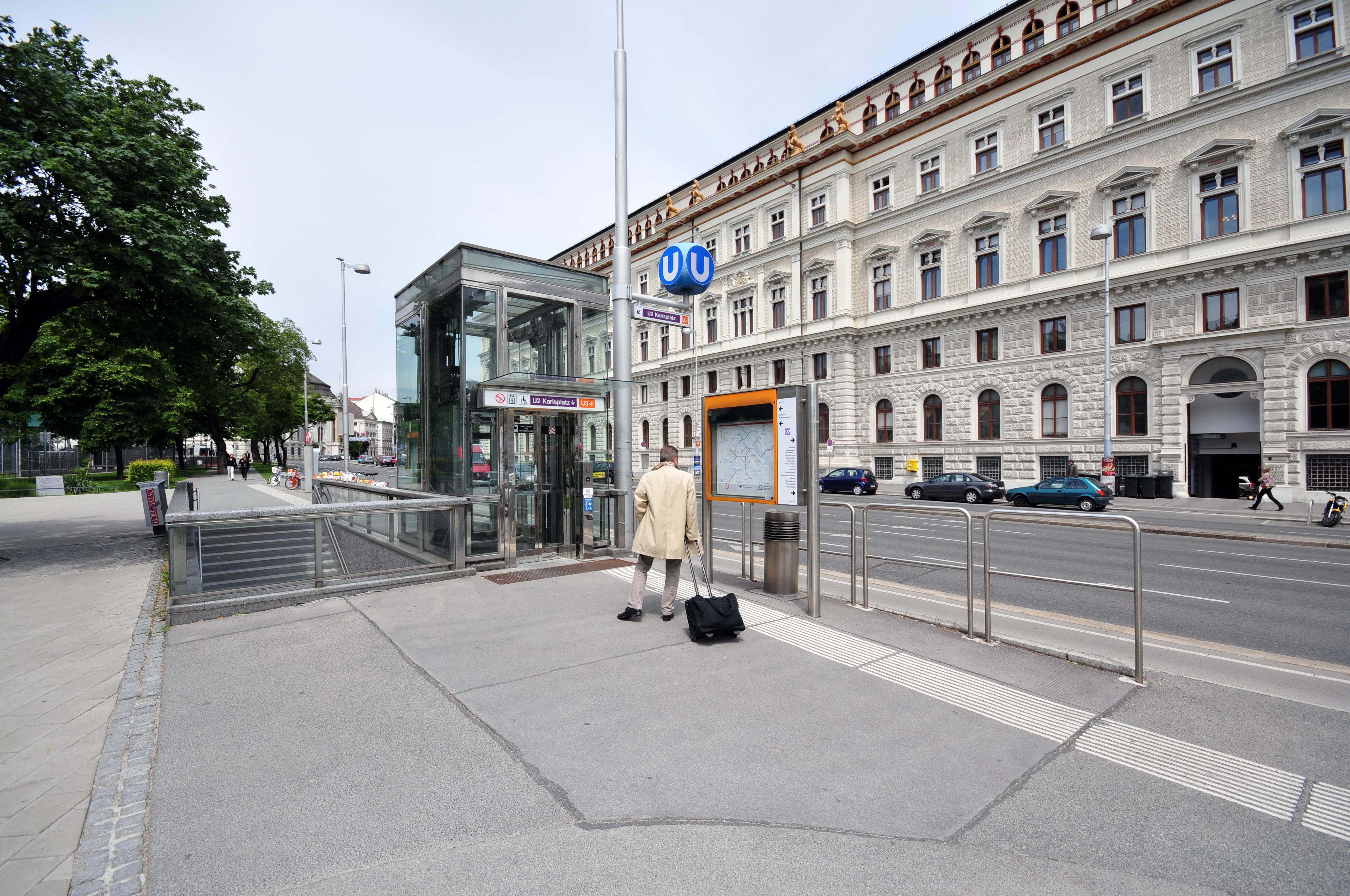 Wien